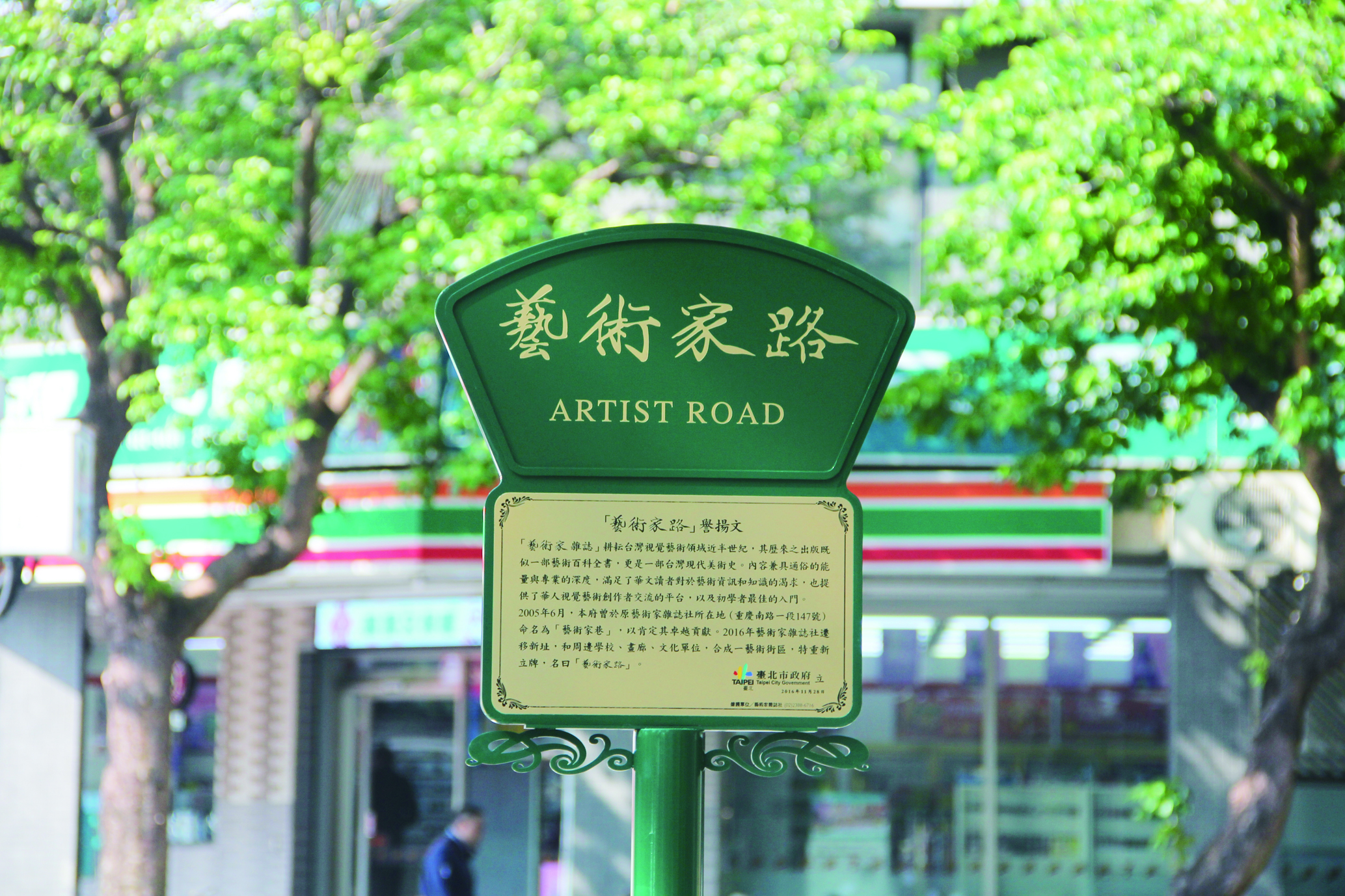 中文（台灣）: 2016年11月28日設置於台北市金山南路與和平東路口的路牌「藝術家路」，是台北市政府為肯定藝術家雜誌社多年在台灣為藝術的耕耘及貢獻，在雜誌社社址所在地金山南路二段設立的譽揚牌。